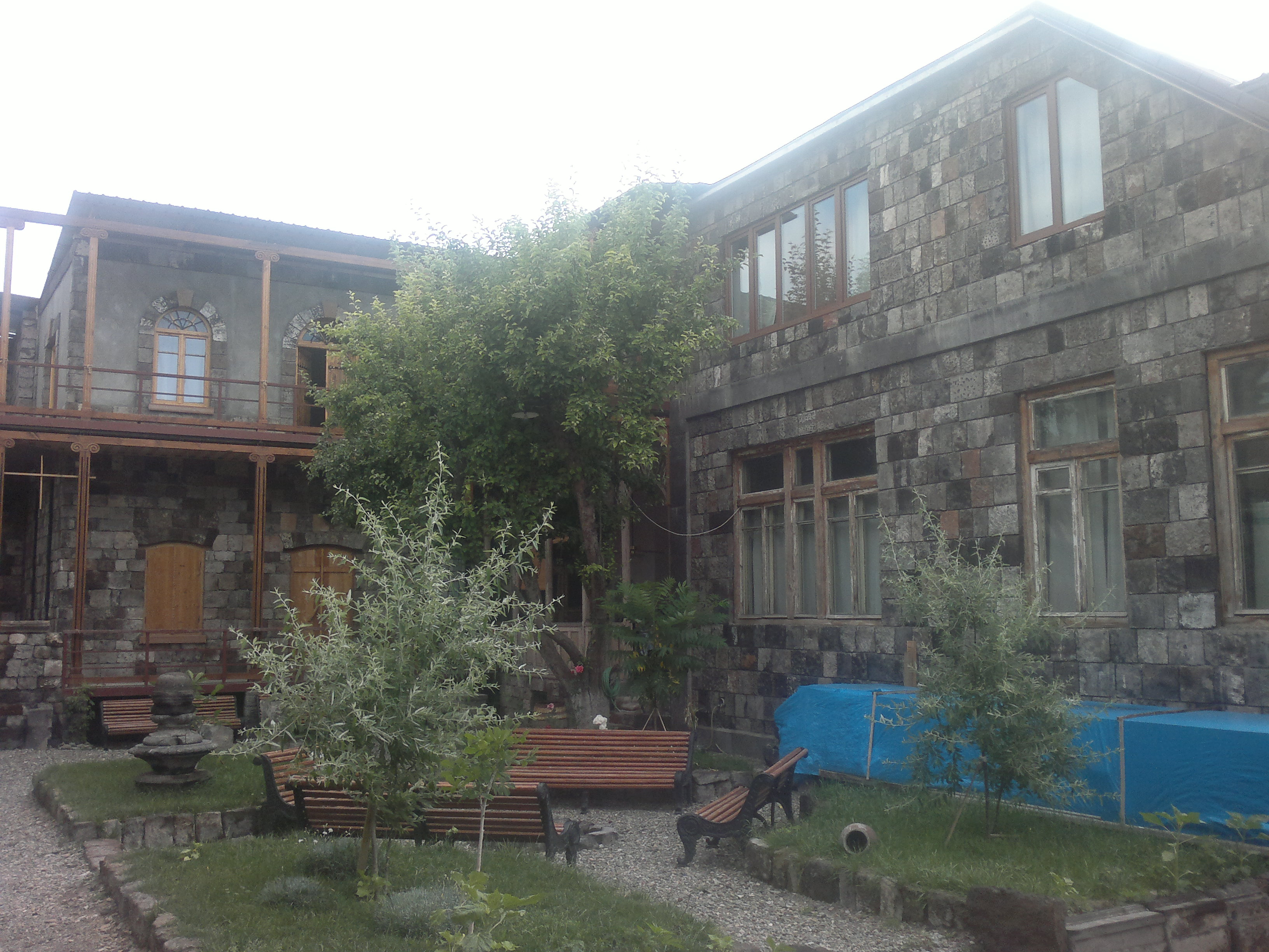 Գյումրվա առանձնատուն